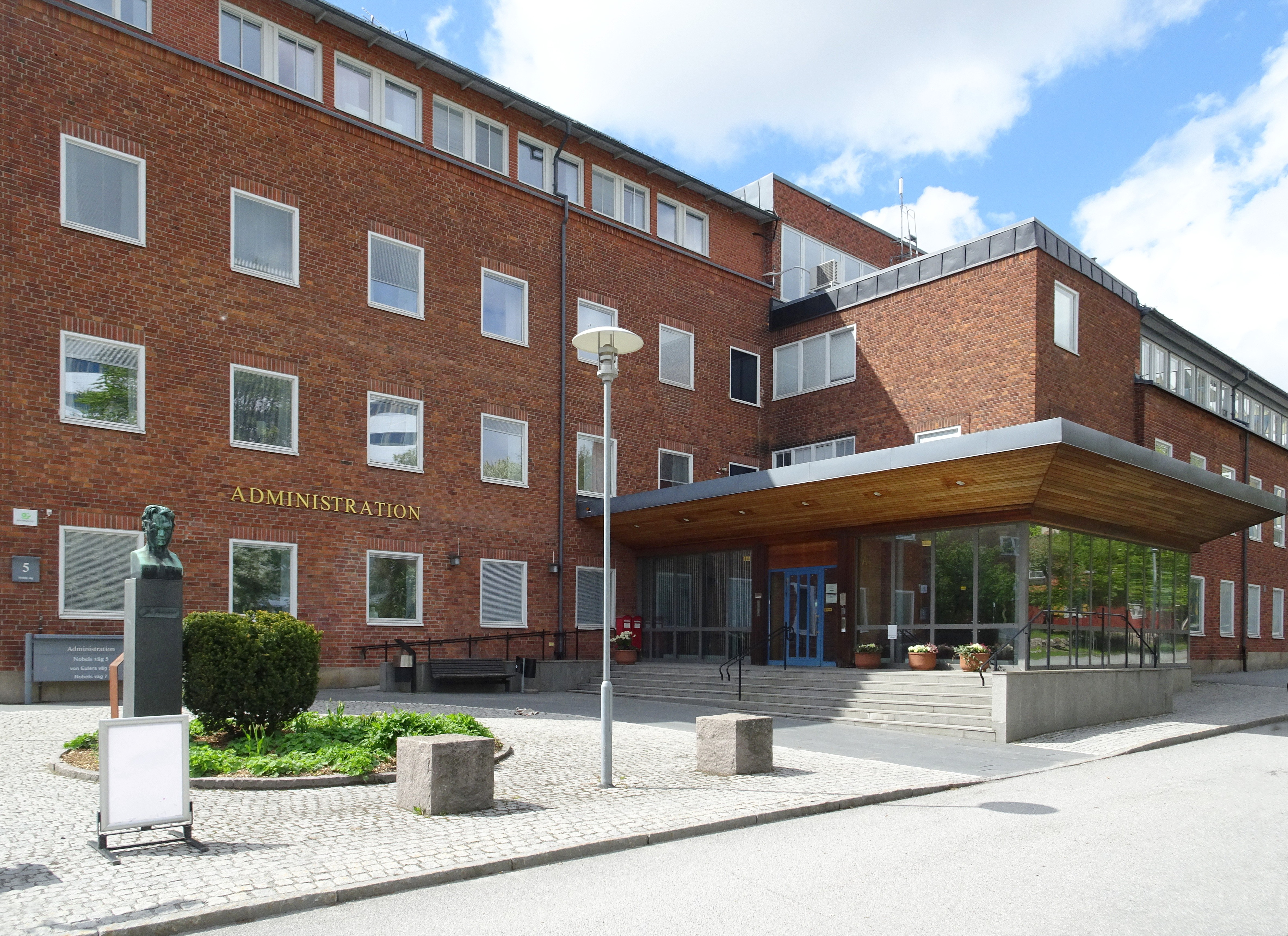 Campus Solna, Nobels väg 5. Ursprungligen Byggnaden för kemiska institutionen uppförd 1950. Sedan 1997 Karolinska Institutets administration, arkitekt Ture Ryberg.